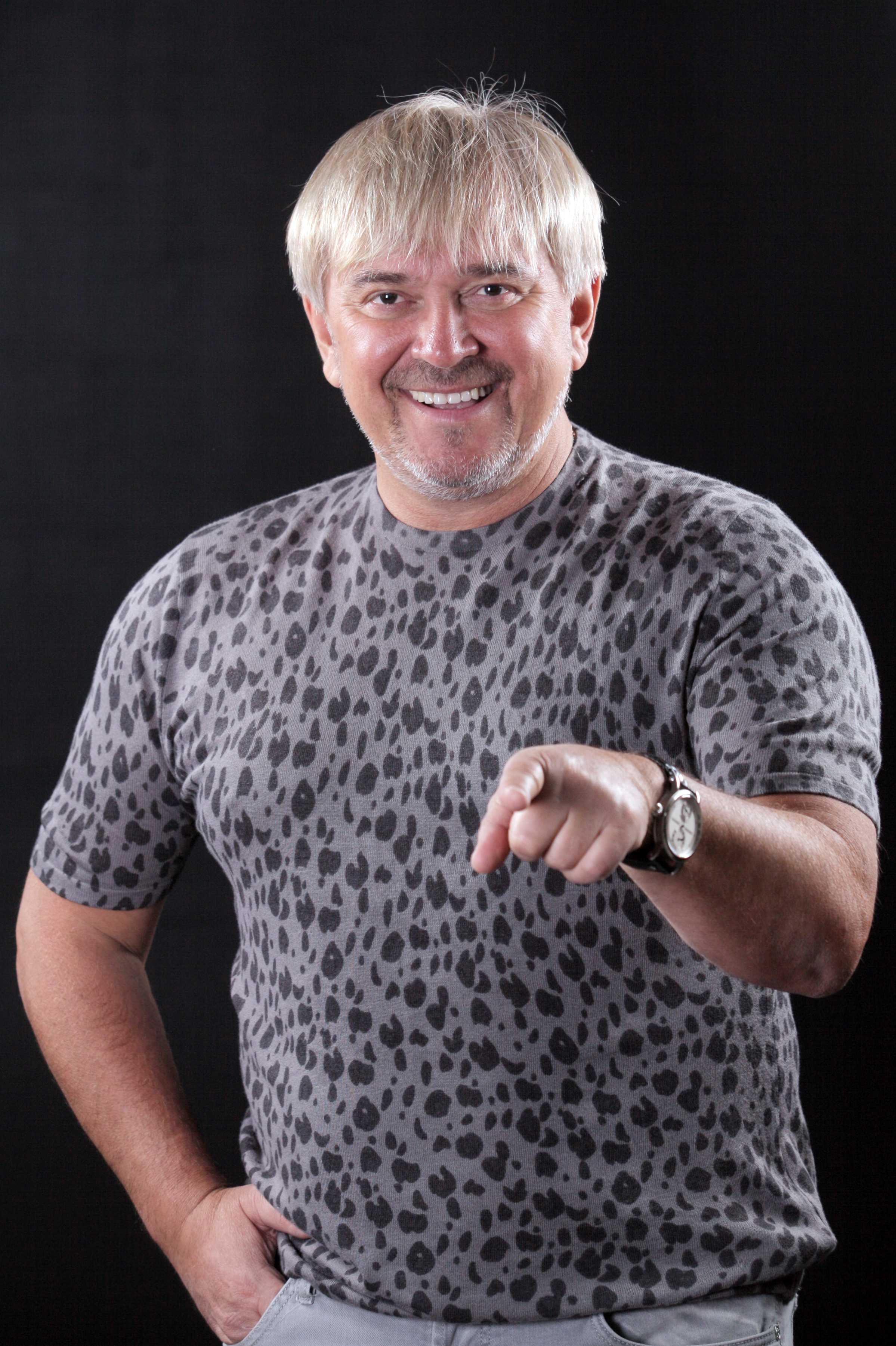 Михайло Грицкан